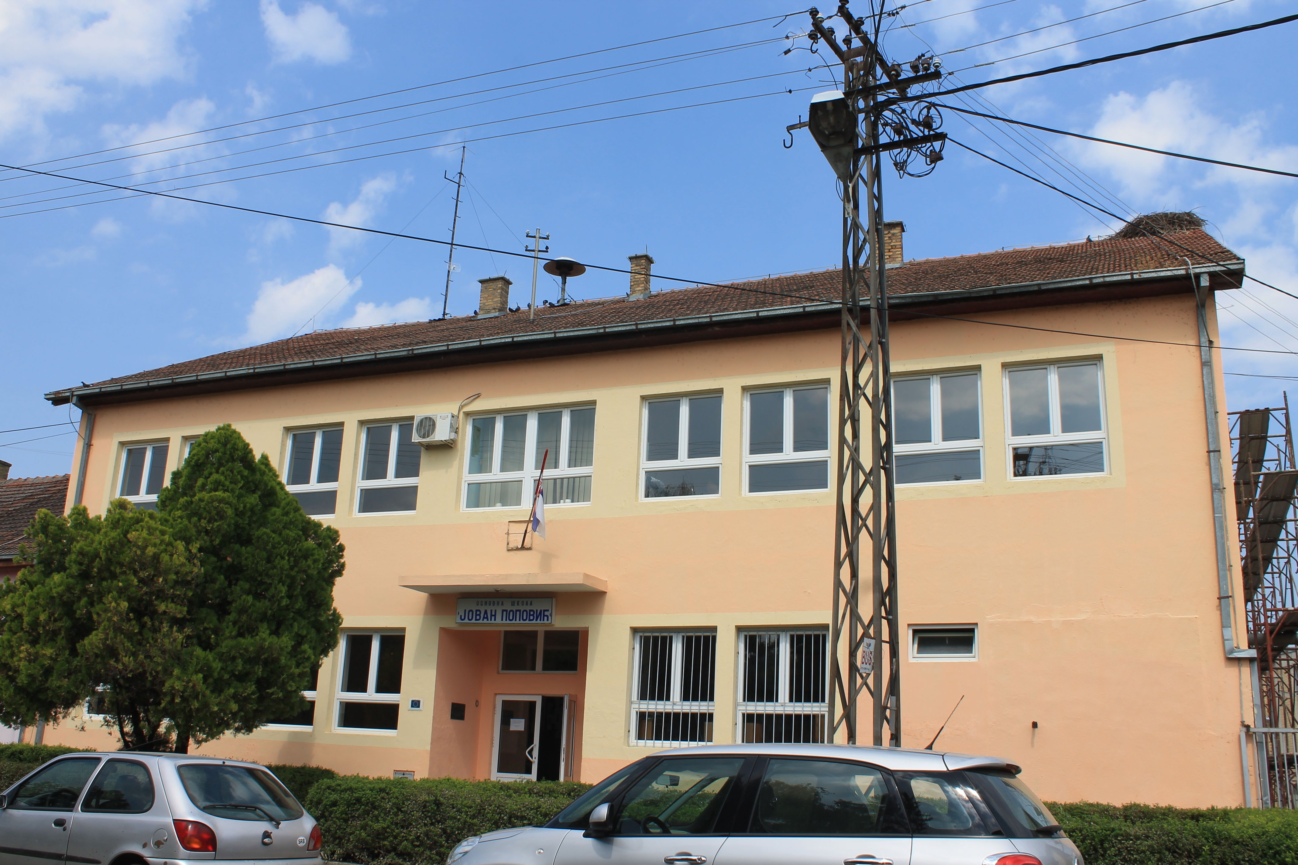 Susek